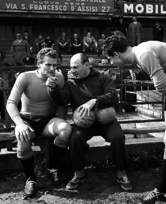 Torino, stadio Filadelfia, 8 aprile 1954. Allenamento della nazionale italiana in preparazione dell'amichevole tra Francia e Italia (1-3) dell'11 aprile 1954 a Parigi. Il capitano azzurro, Giampiero Boniperti (a sinistra), ascolta il membro della commissione tecnica italiana, Lajos Czeizler (al centro), durante una pausa della sessione; con loro, Amleto Frignani (a destra).